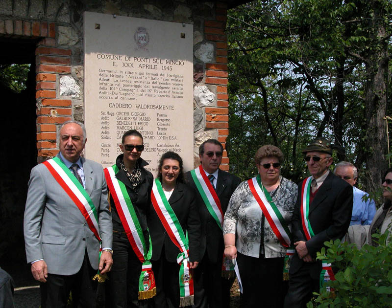 Cerimonia per l'anniversario della battaglia di Monte Casale (Ponti s/M -Mn) 1 maggio 2005